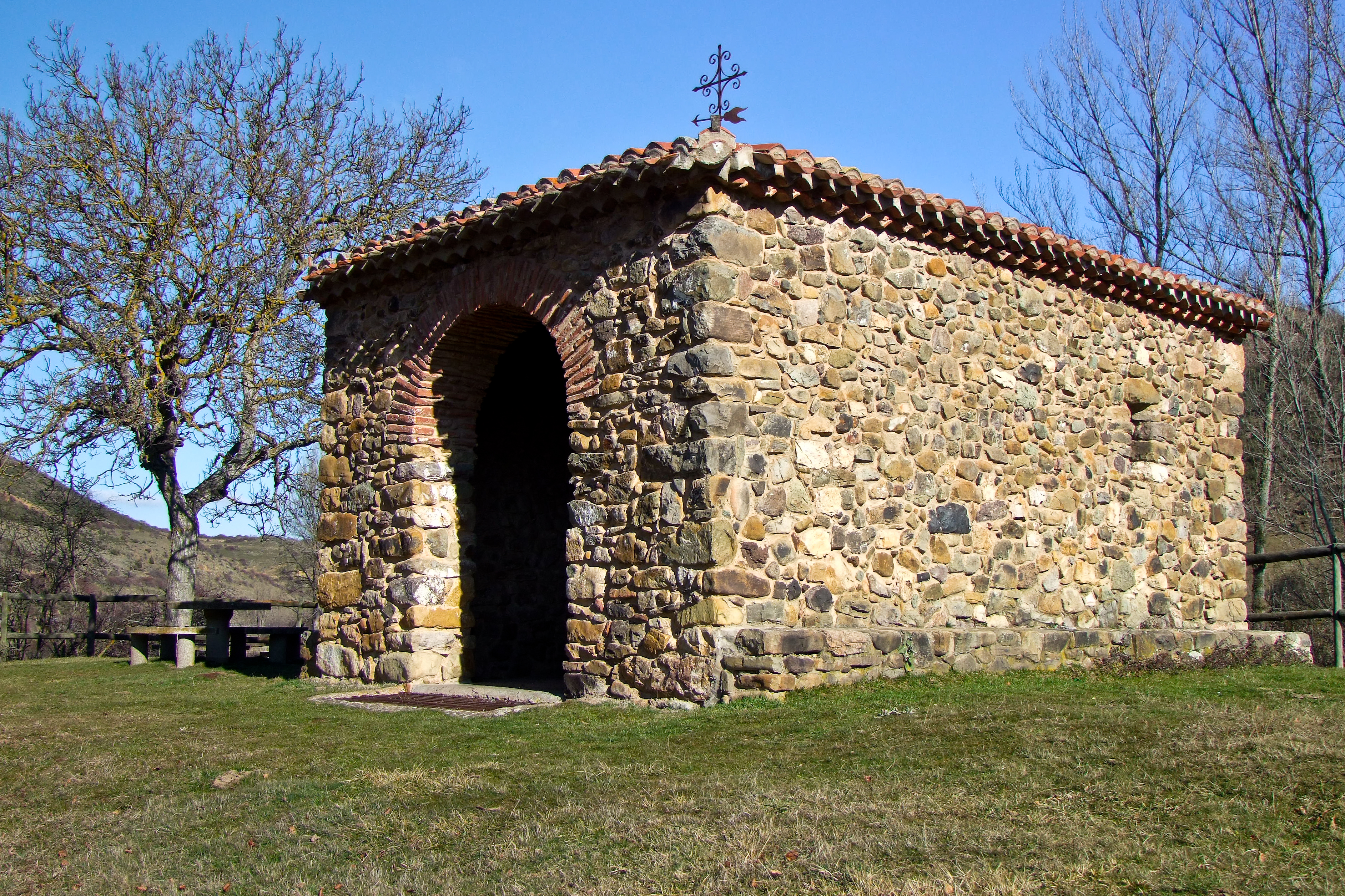 Ermita de Santa Apolonia en Laguna de Cameros, La Rioja - España